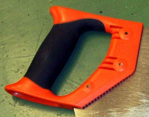 zelfgemaakte foto voor het publiek domein. Martink.